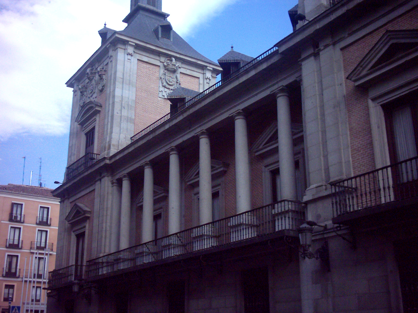 Ayuntamiento de Madrid: La Casa de la Villa. Columnata de Villanueva. Madrid, Spain: Major House: Façade by Juan de Villanueva.